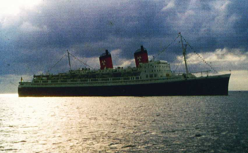 TS Hanseatic, eingescanntes Dia